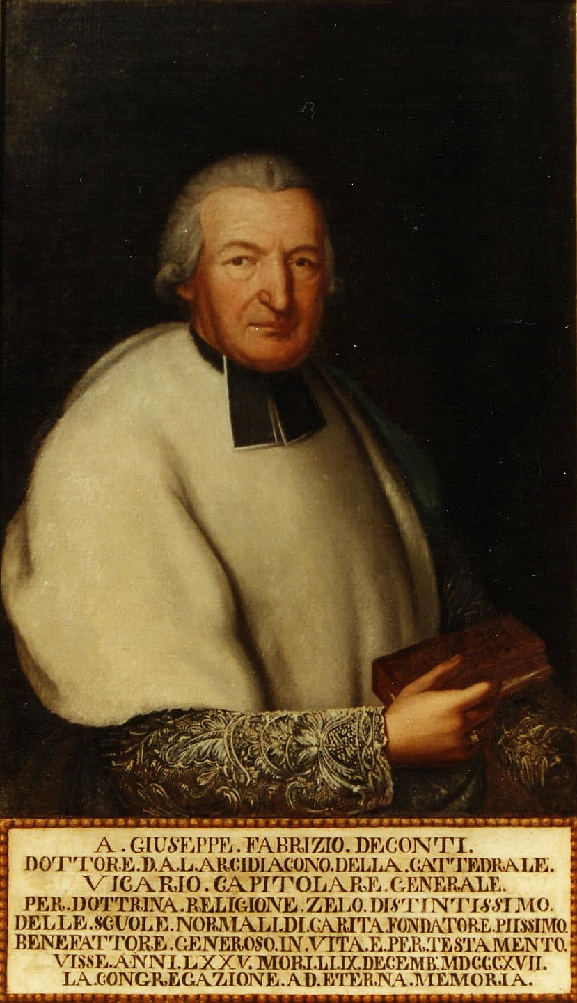 Dipinto realizzato all'inizio del XIX secolo